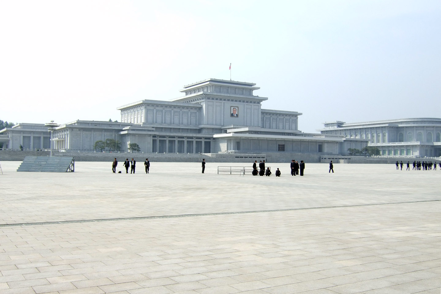 Kumsusan Memorial Palace, Pyongyang